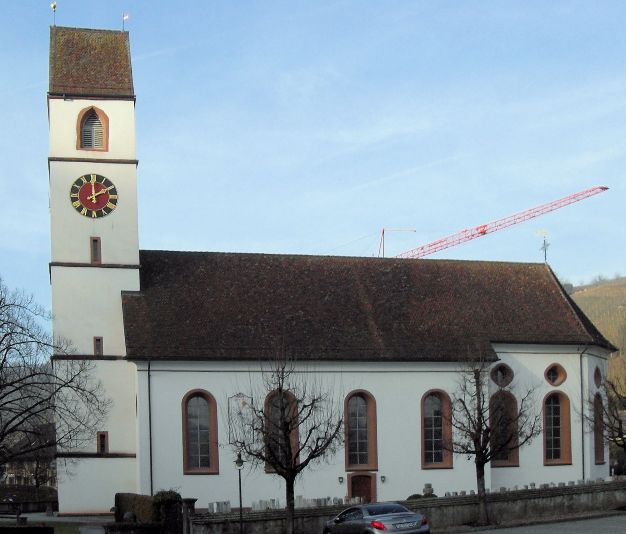 Südostseite der Pfarrkirche St. Remigius in Mettau, Kanton Aargau, Schweiz